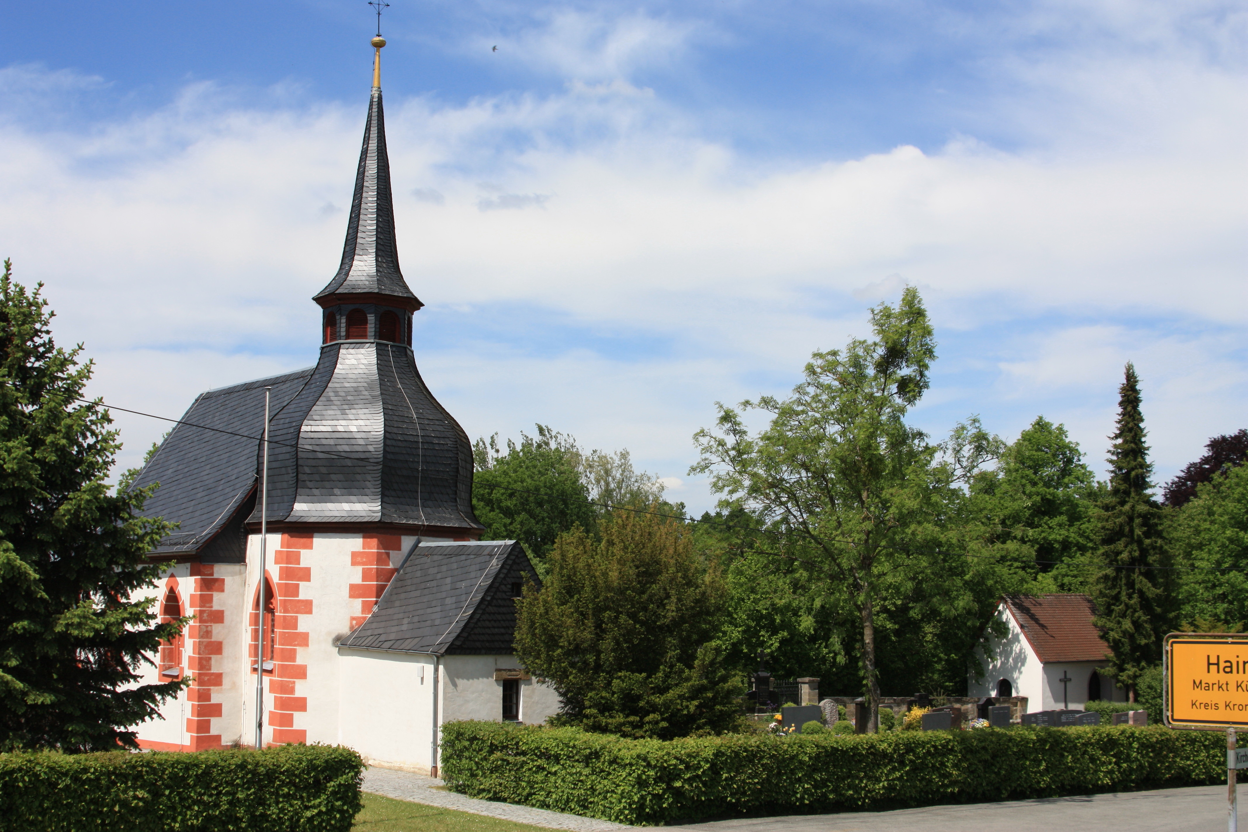 Küps OT Hain